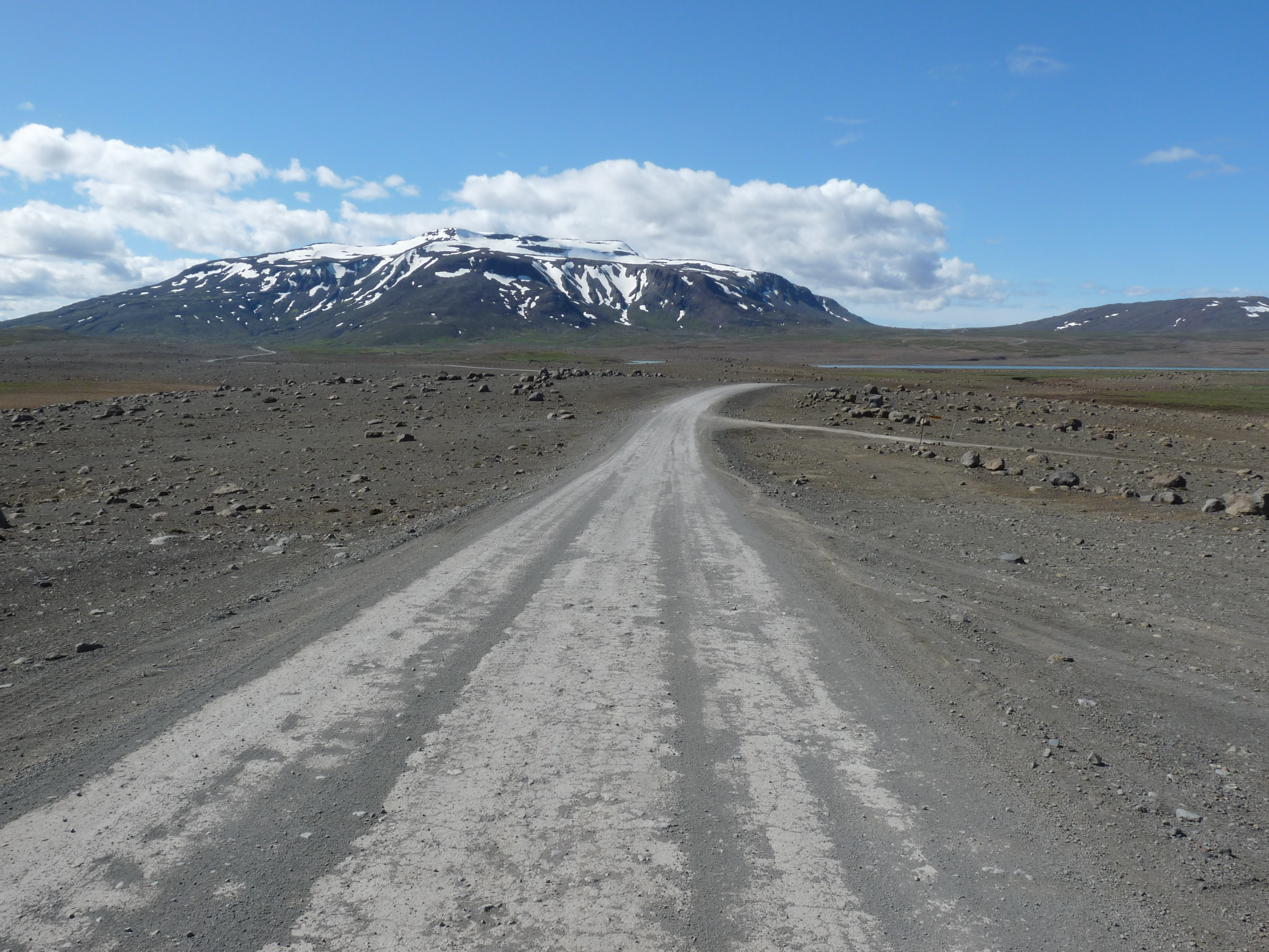 Uktzicht bij de halte Hvítárnes Crossroads. De berg op de achtergrond is de Geldingafell.